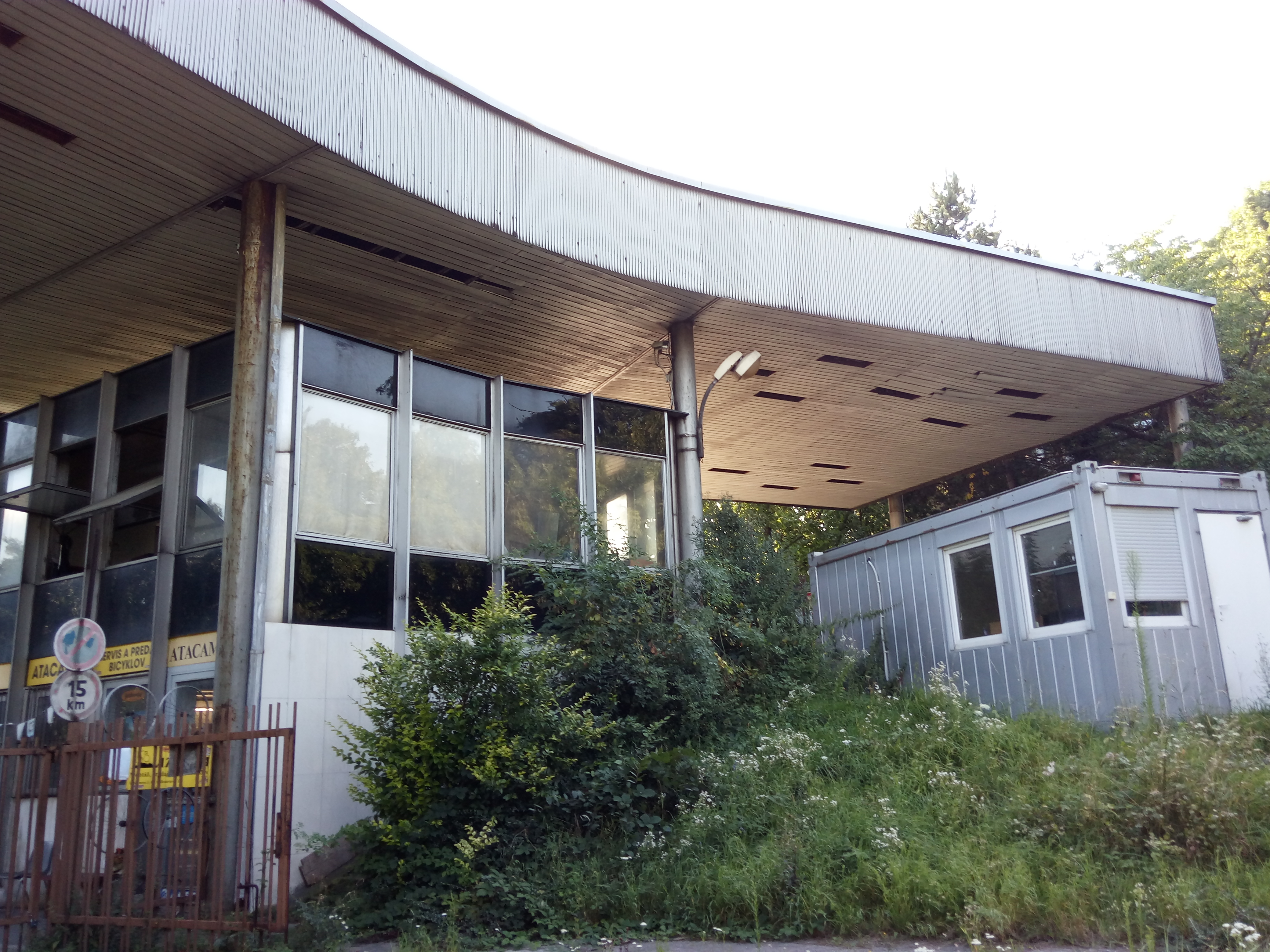 Brečtanová 1, Nové Mesto, Bratislava